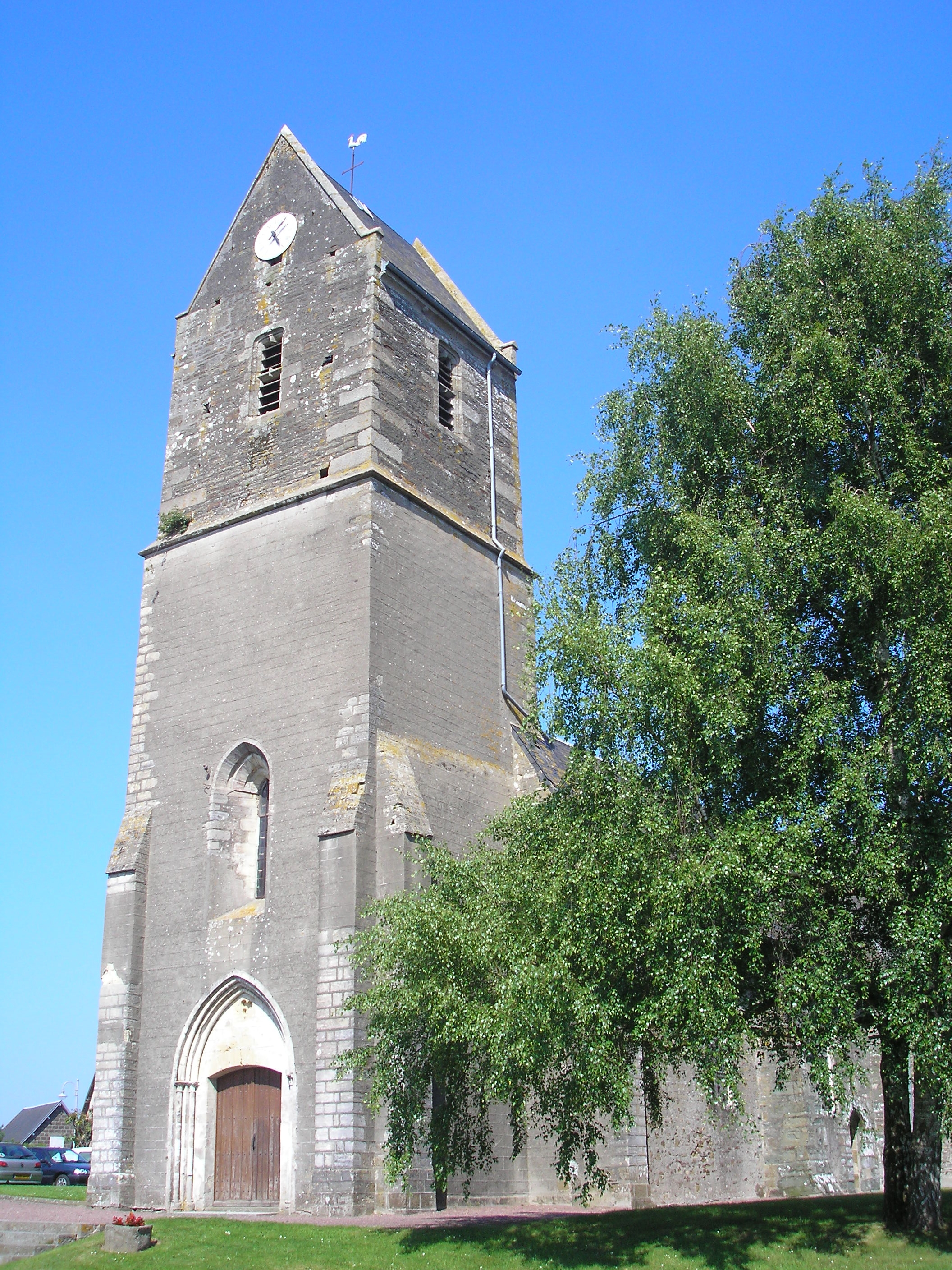 Guilberville (Normandie, France). L'église Saint-Mathurin.